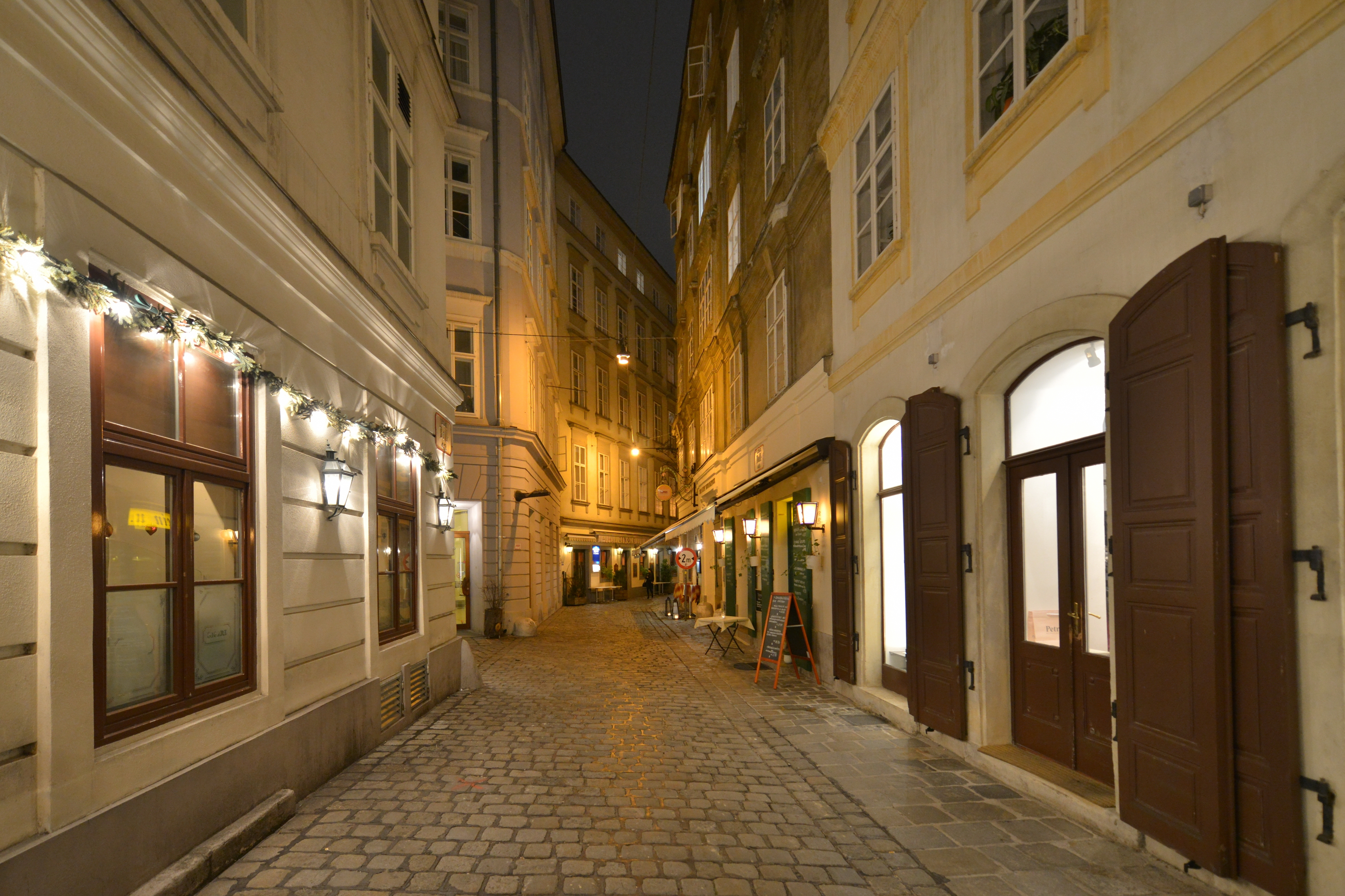 Ballgasse in Wien.